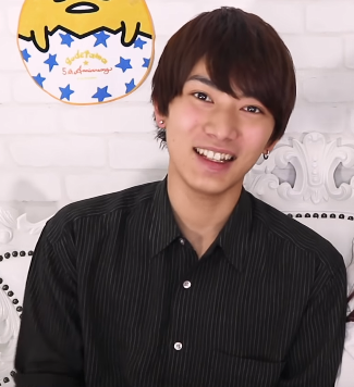 那須泰斗です。